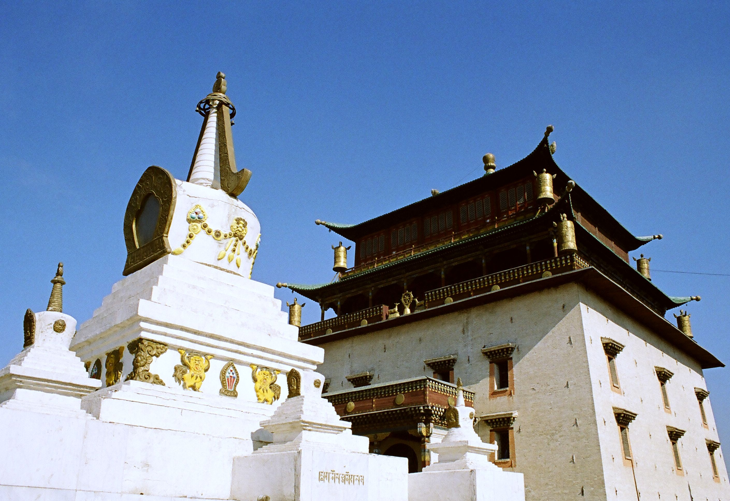 Gandan Khiid, Ulan Bator, Mongolia